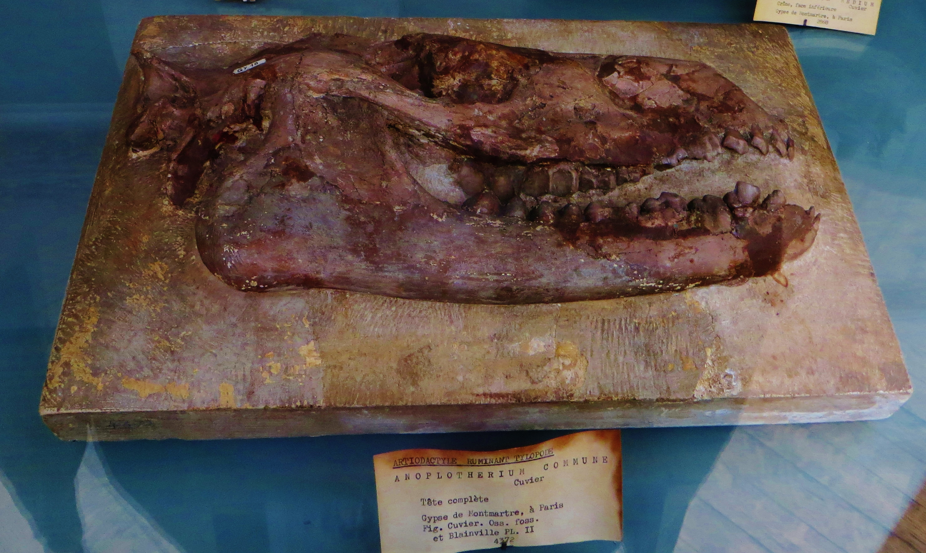 Fossil of Anoplotherium, an extinct mammal - Took the photo at Museum Histoire Naturelle, Paris